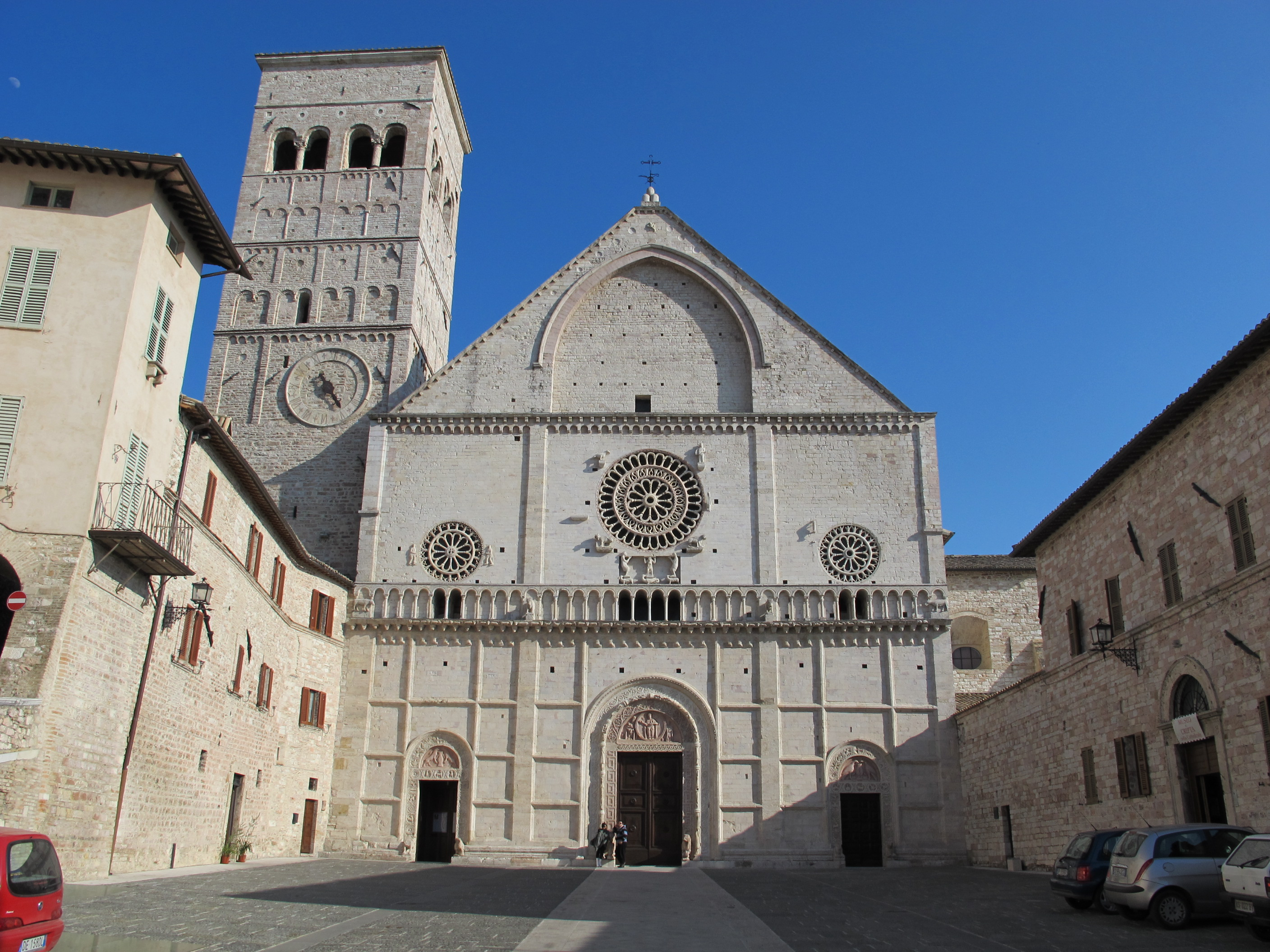 Assisi, san rufino